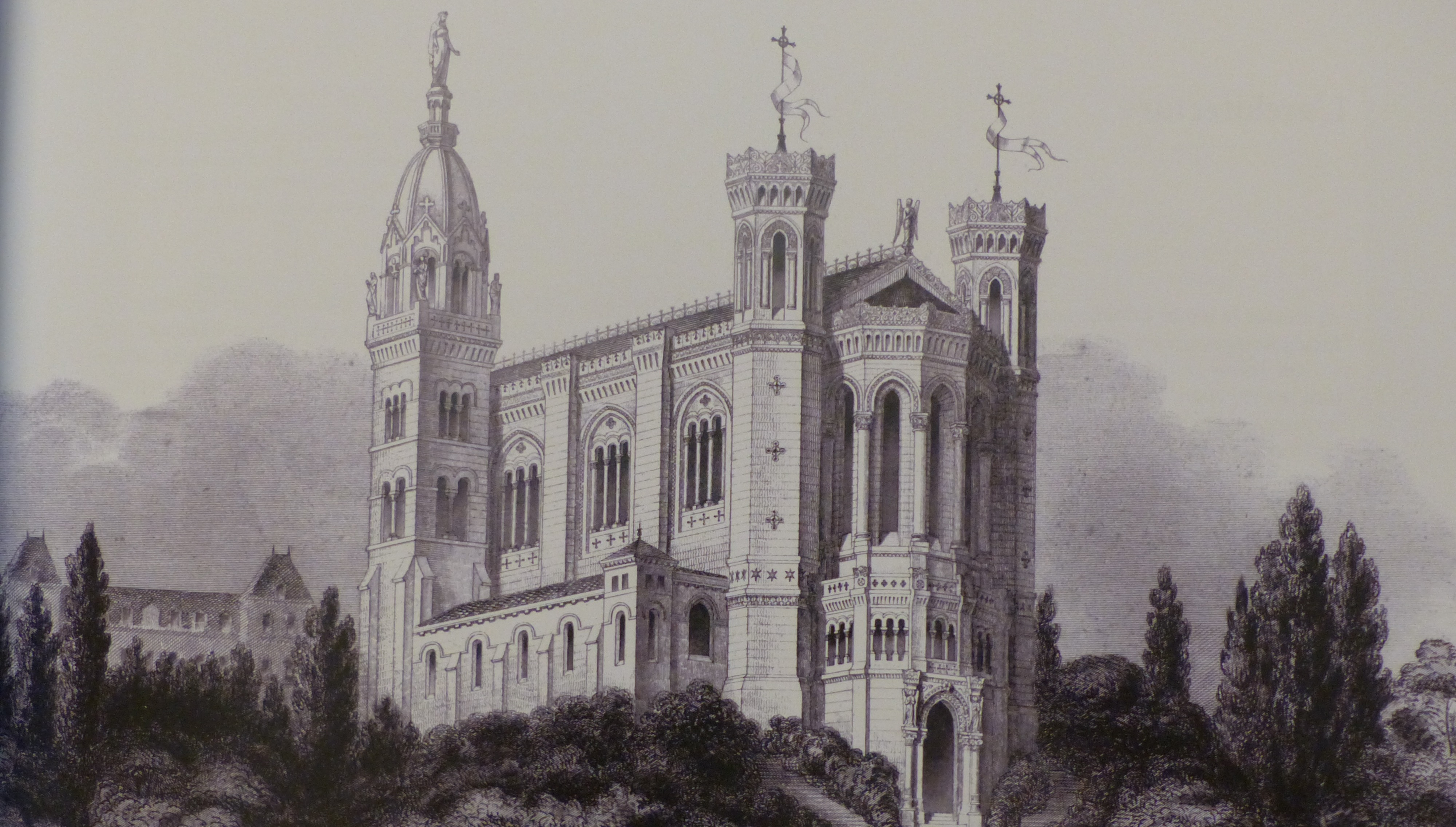 Première esquisse de la future basilique de Fourvière, par Pierre Bossan (gravure par Joanny Séon), diffusée en avril 1856.